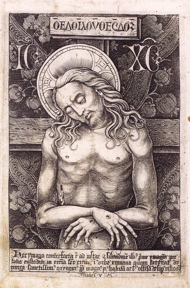 Kleines Andachtsbildchen mit lateinischer Inschrift unterhalb des Blattes (sog. "Gregorianischer Schmerzensmann").